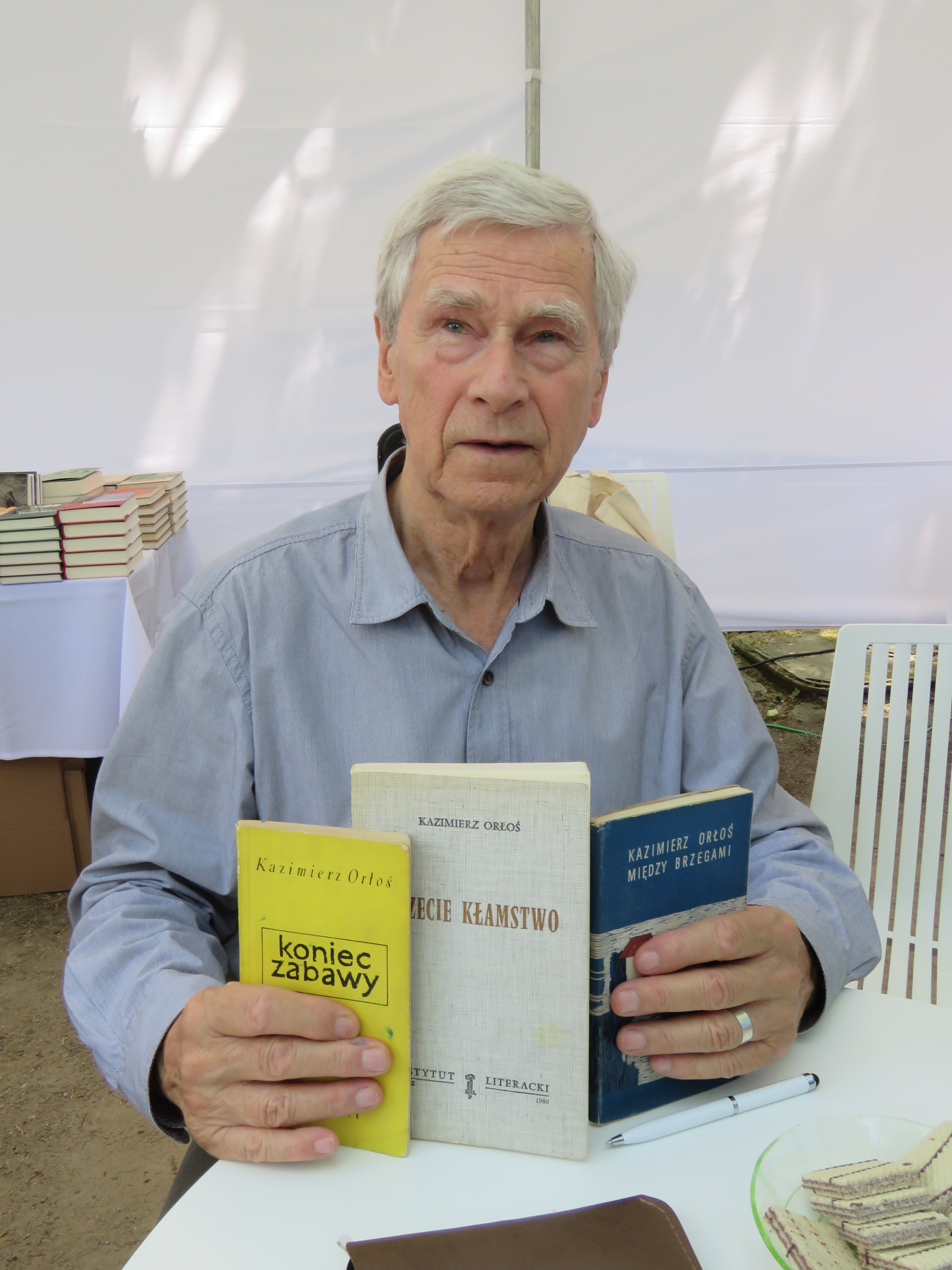 Kazimierz Orłoś (b. December 26, 1935 in Warsaw, Poland) - Polish writer. He lives in Warsaw